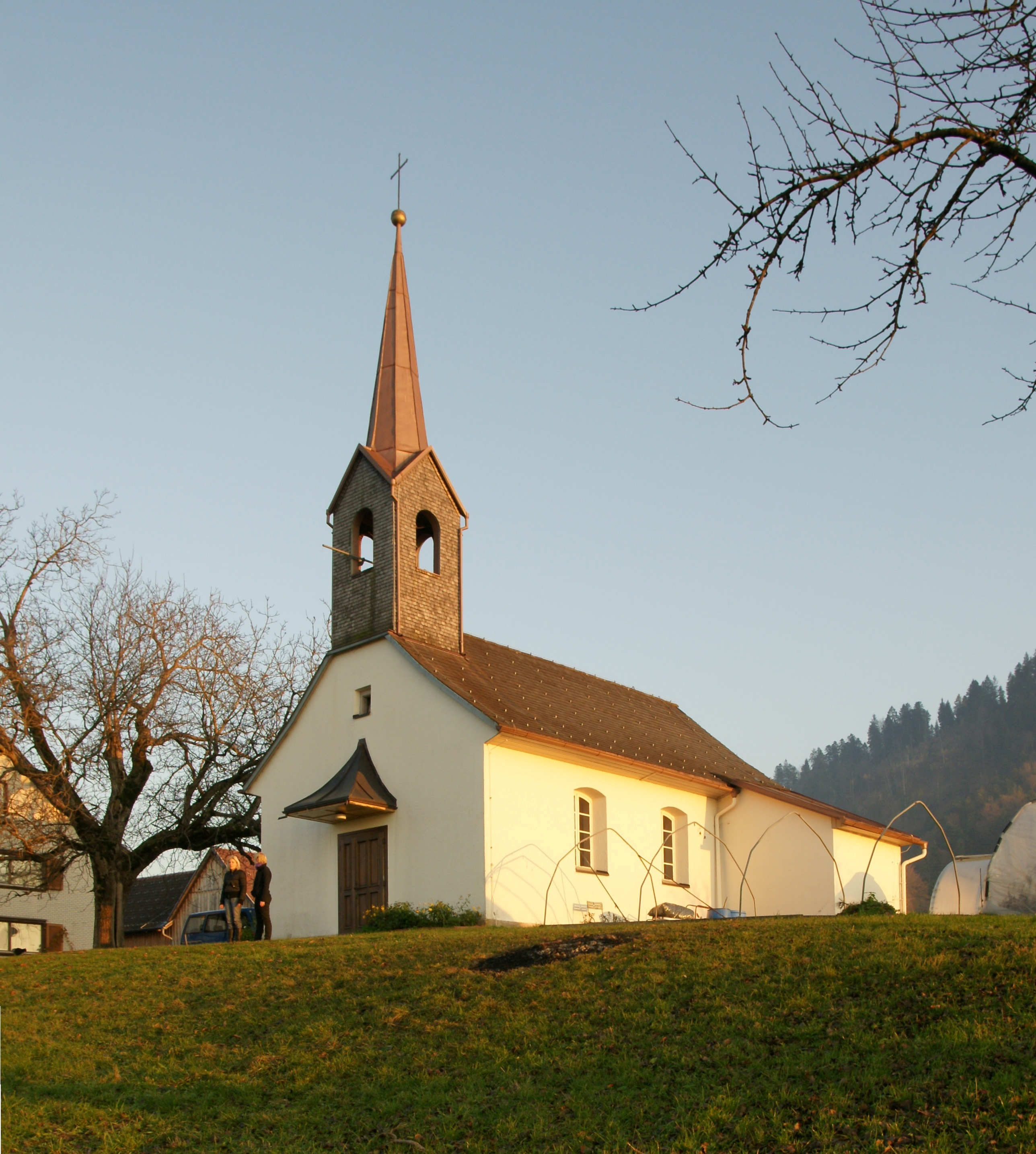 Kapelle Maria Hilf auf der Bergpazelle Jennen, oberhalb von Dornbirn.